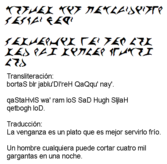 Frase de ejemplo en klingon con alfabeto pIqaD del KLI